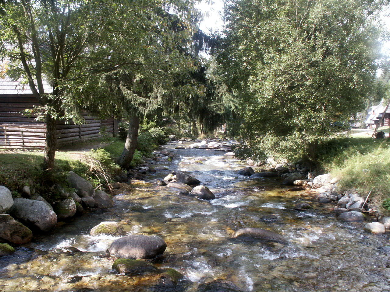 Potok protékající Muzeem oravské dědiny